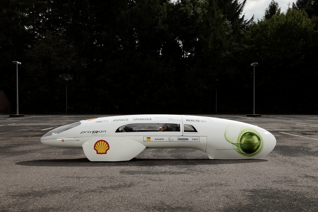 proTRon